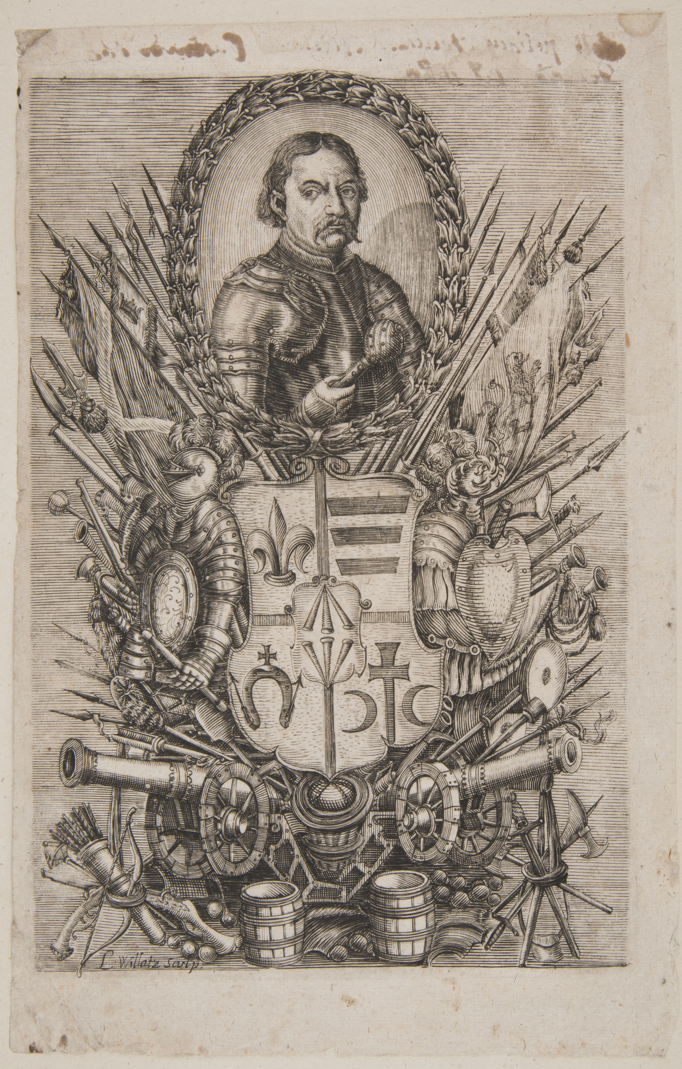 Беларуская (тарашкевіца): Партрэт Уладзіслава Валовіча (Uładzisłaŭ Vałovič)